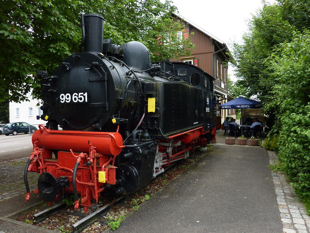 Steinheim: Dampflok vor dem alten Bahnhof